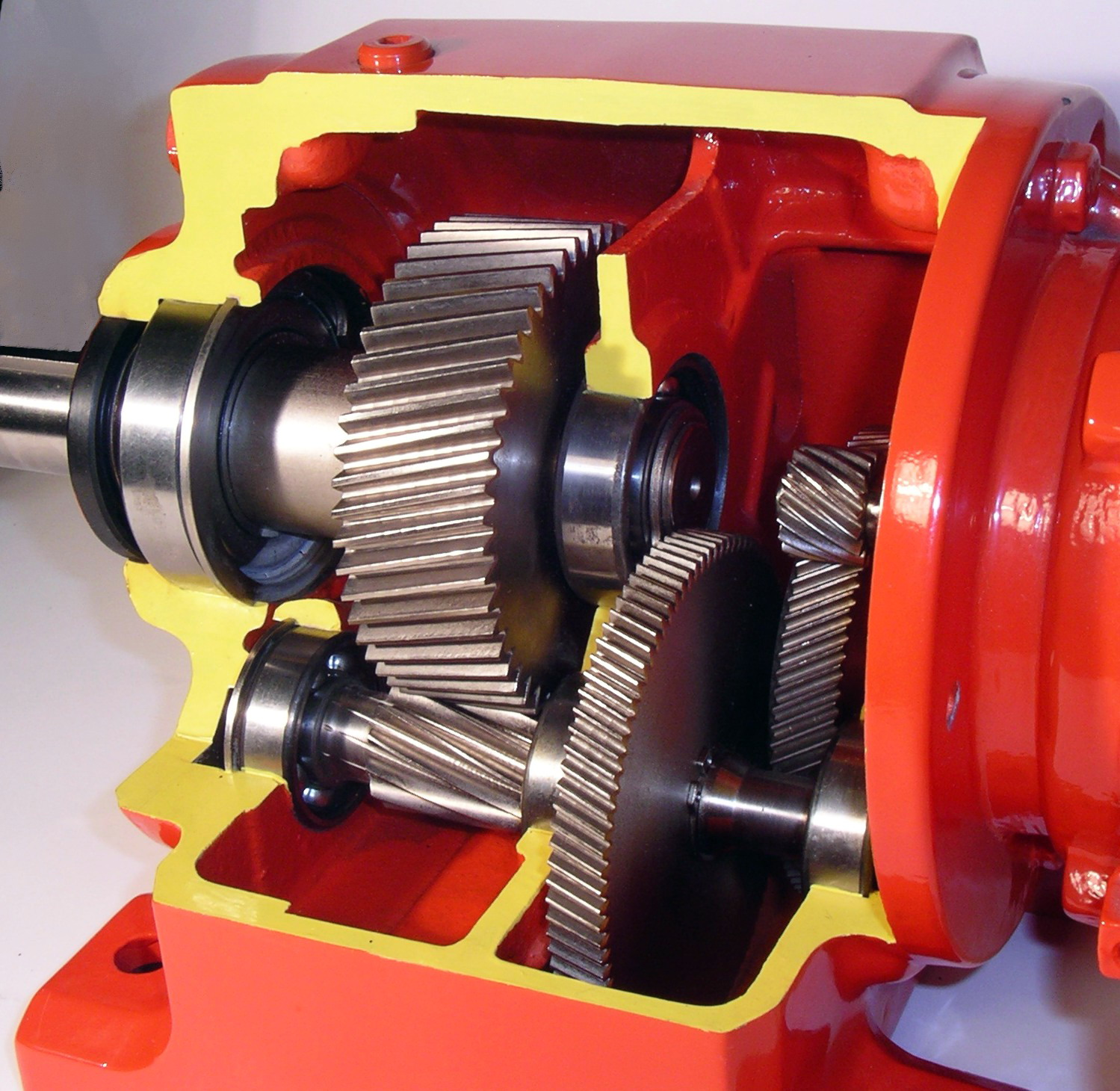 Aufgeschnittenens dreistufiges Strinradgetriebe mit schräger Verzahnung